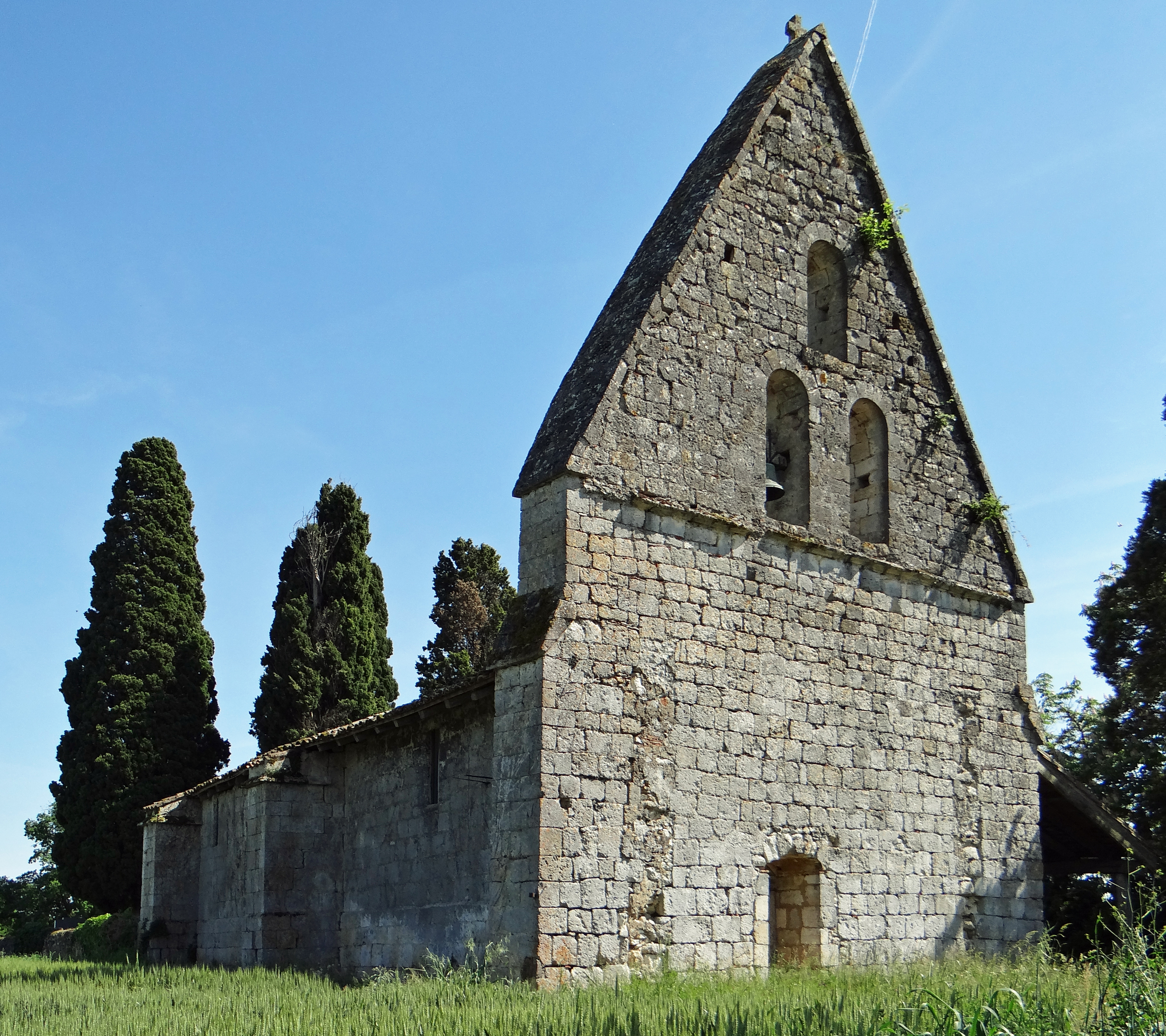 Lannes - Église Saint-Jean-Baptiste de Cazeaux - Ensemble